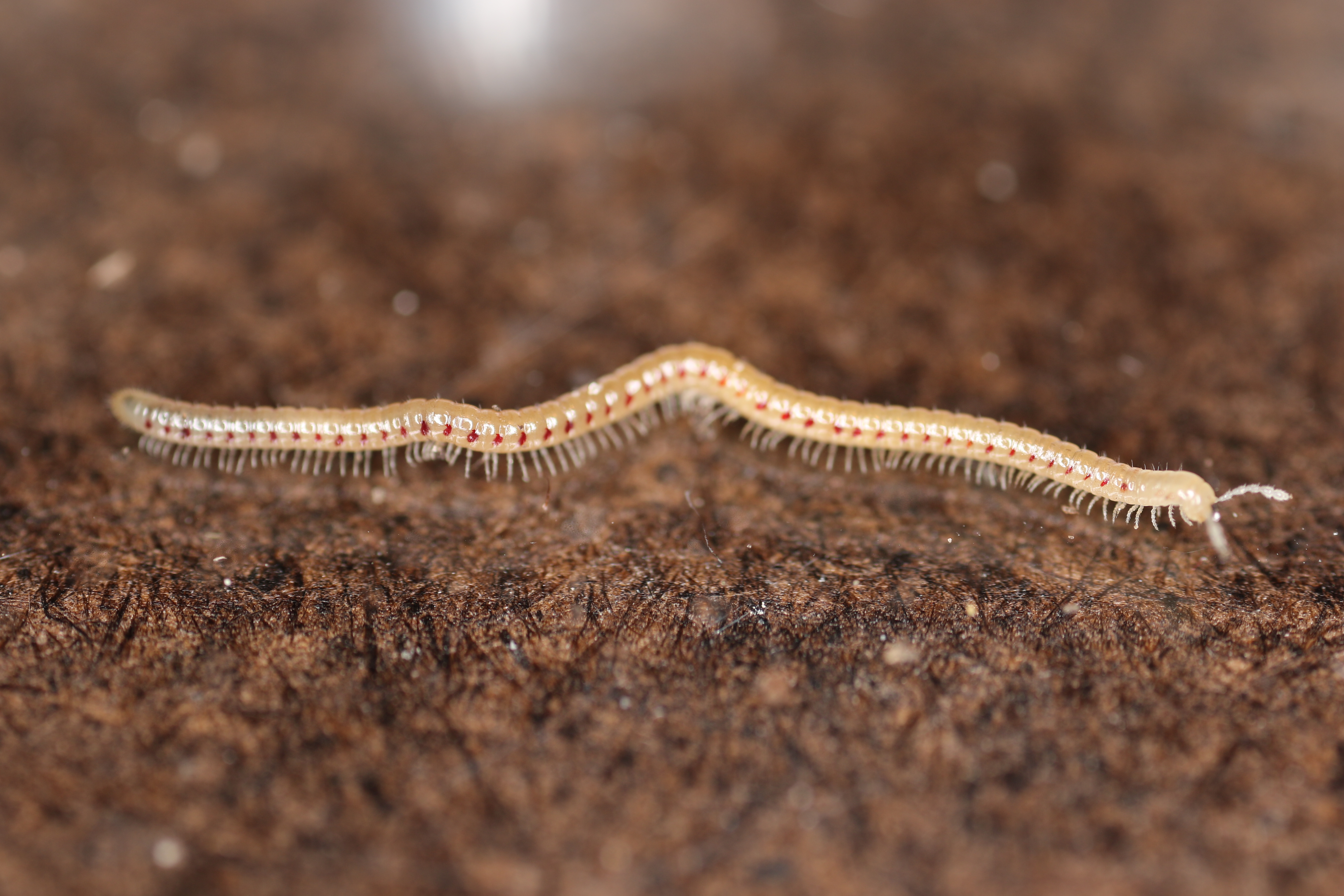 Blaniulus guttulatus (Fabricius, 1798), Søborg, Denmark, 16 April 2016